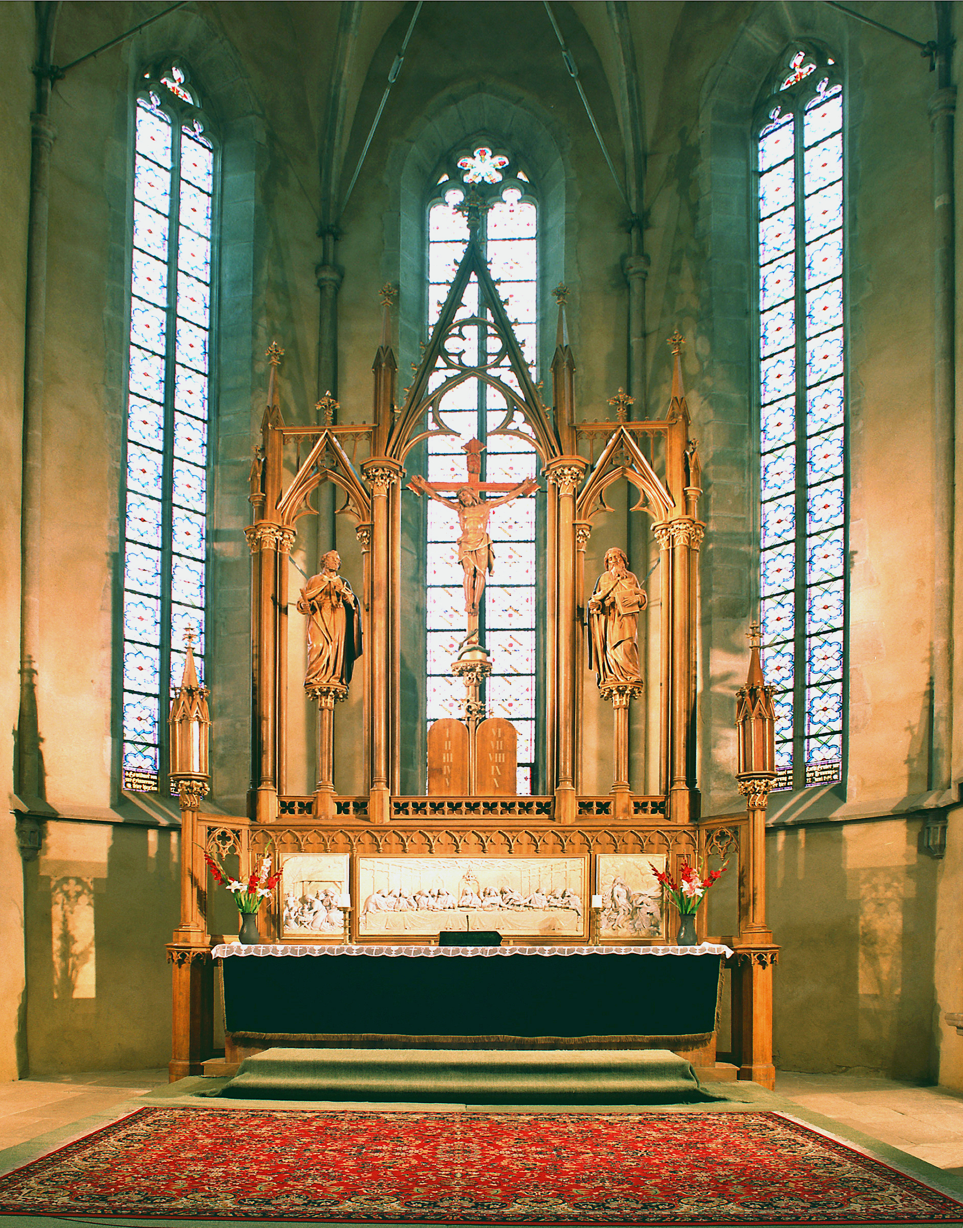 Altar der Stadtpfarrkirche in Hermannstadt. Der heutige Altar entstand 1854 in einer Wiener Werkstatt. (Baudenkmäler in Siebenbürgen, Heft 18, vom ABF Architekturbüro Fabini-Hermannstadt herausgegeben.)